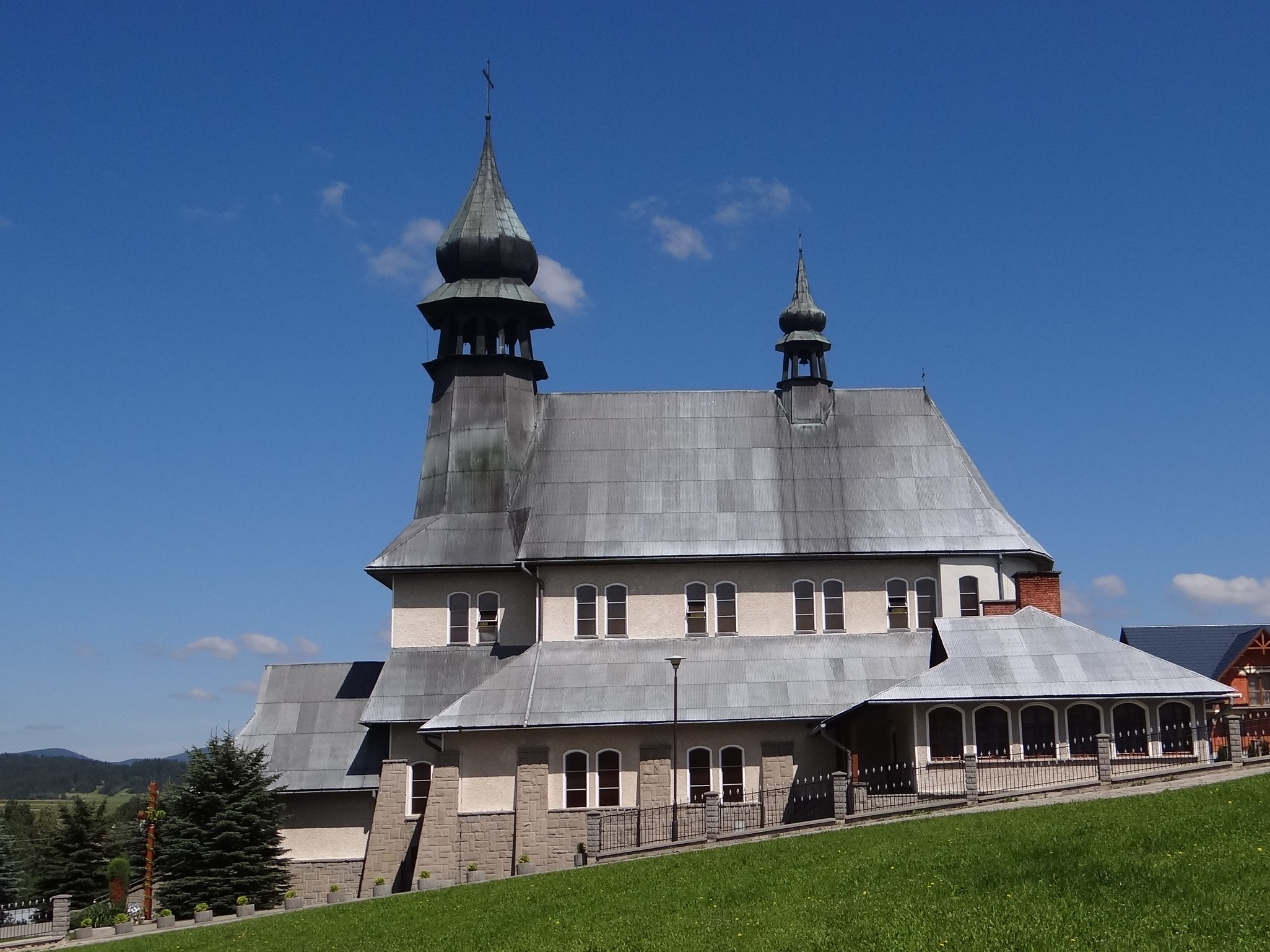 Zubrzyca Dolna - kościół parafialny p.w. Matki Bożej Szkaplerznej